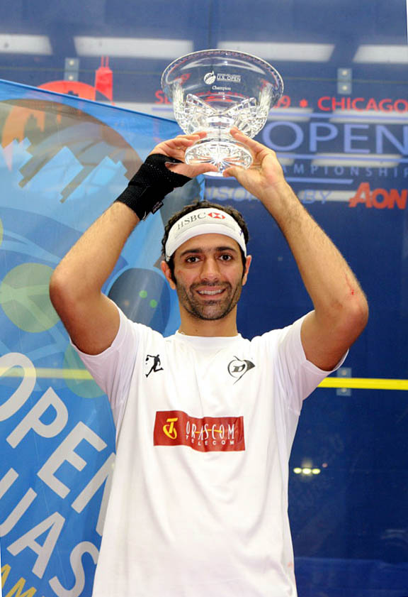 Amr Shabana